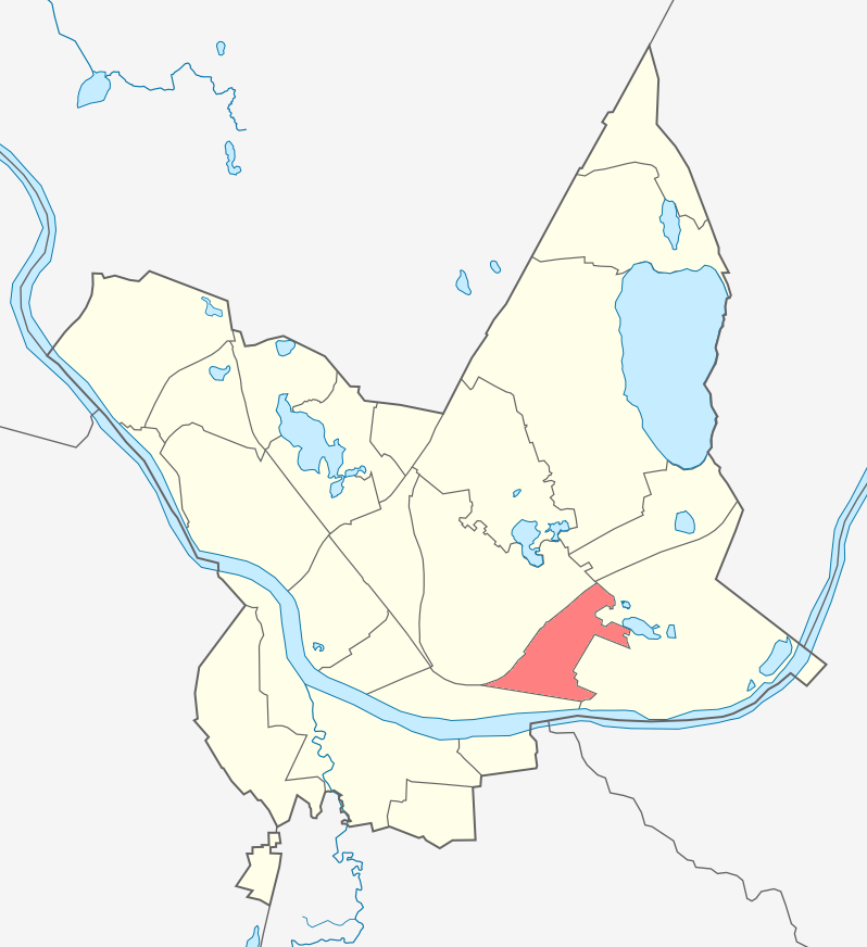 Микрорайон Черепово карте Даугавпилса.